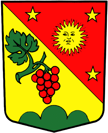 Wappen von Randogne Kanton Wallis Schweiz